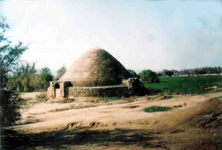 اب انبار قطب اباد